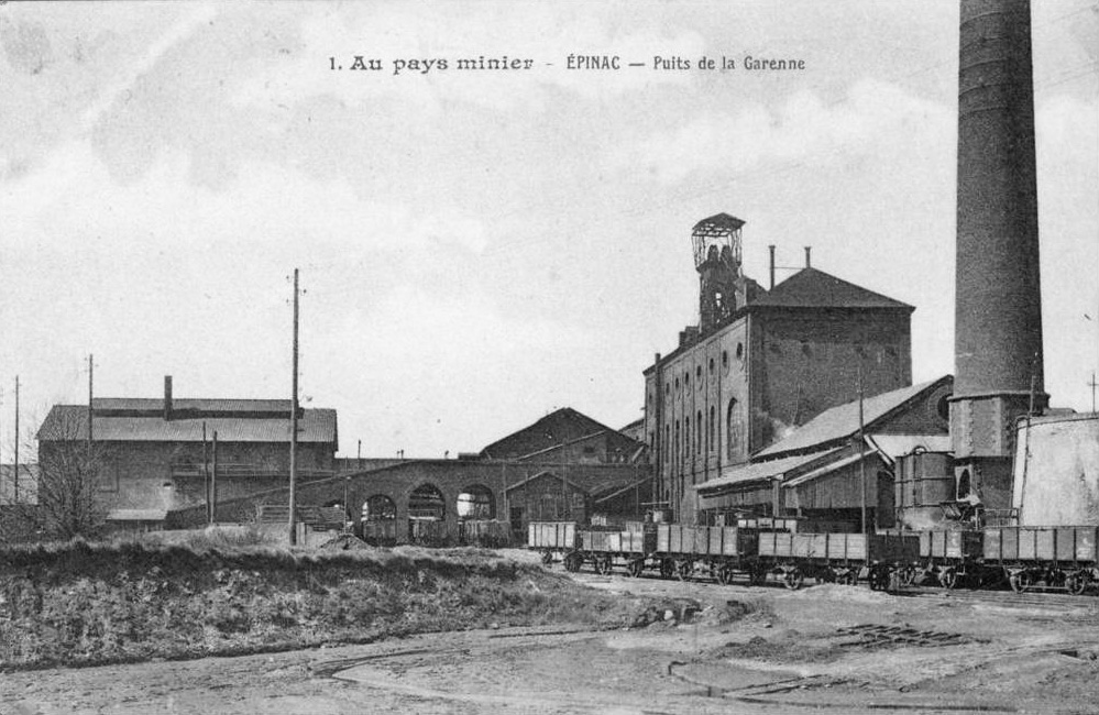 Le puits de la Garenne (Houillères d’Épinac, France).